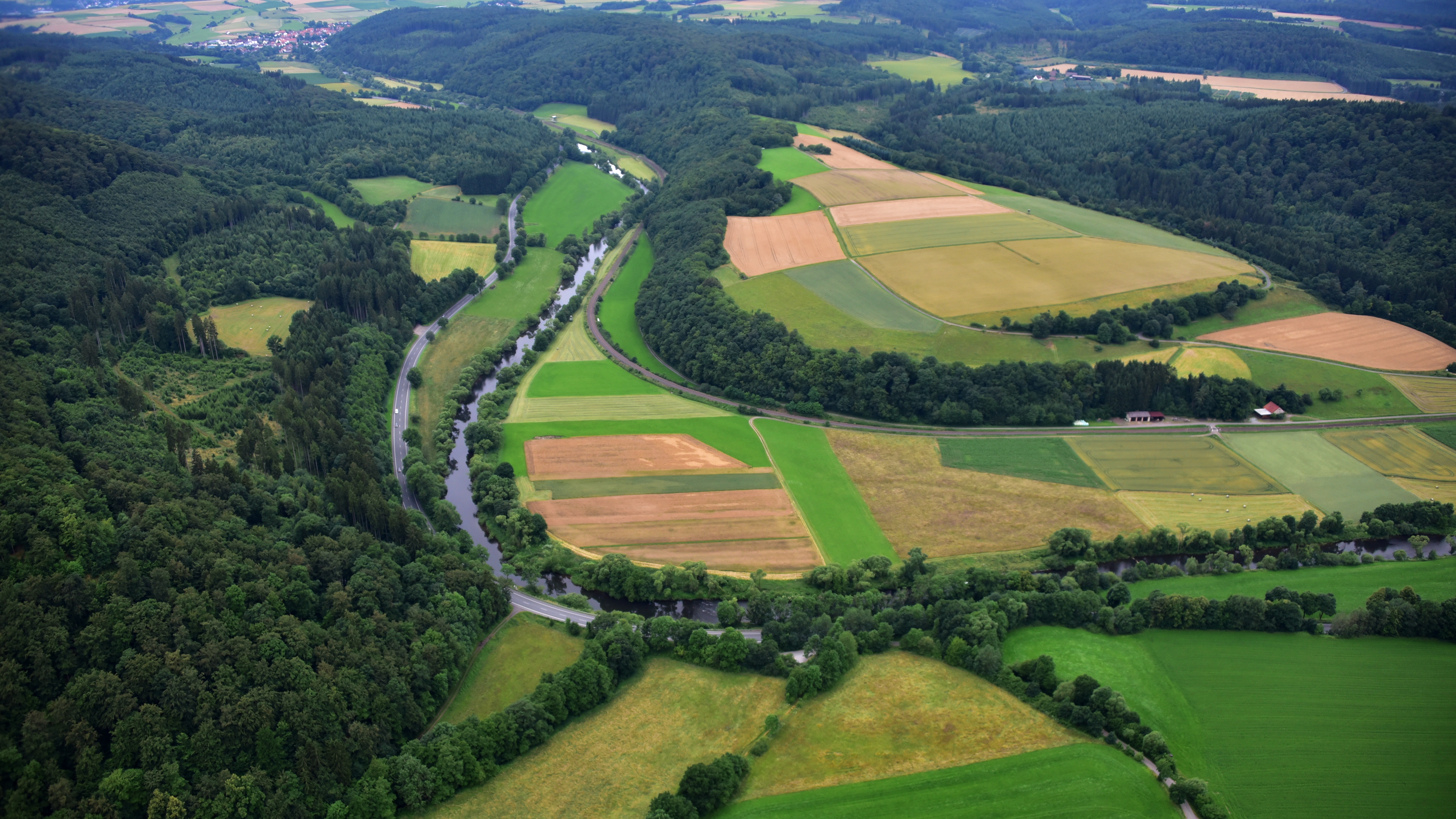 Die Eder etwa 1,5 km südlich von Ederbringhausen; im Hintergrund Viermünden (Luftaufnahme; 2016)